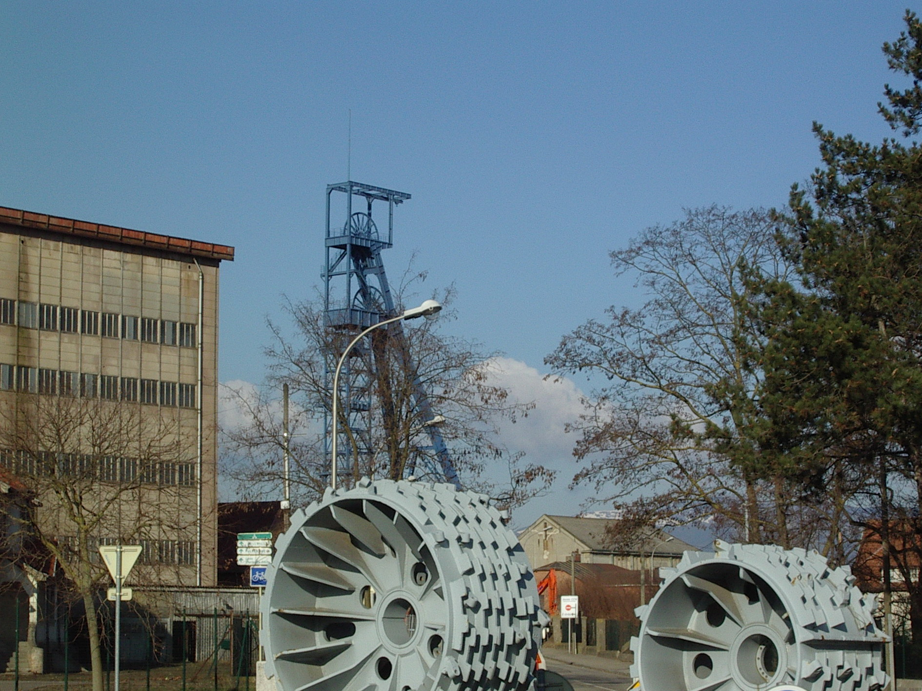 Vestiges des mines de potasse d'Alsace : le carreau Théodore à Wittenheim, Haut-Rhin, Alsace, France. Le chevalement a une hauteur de 64 m.